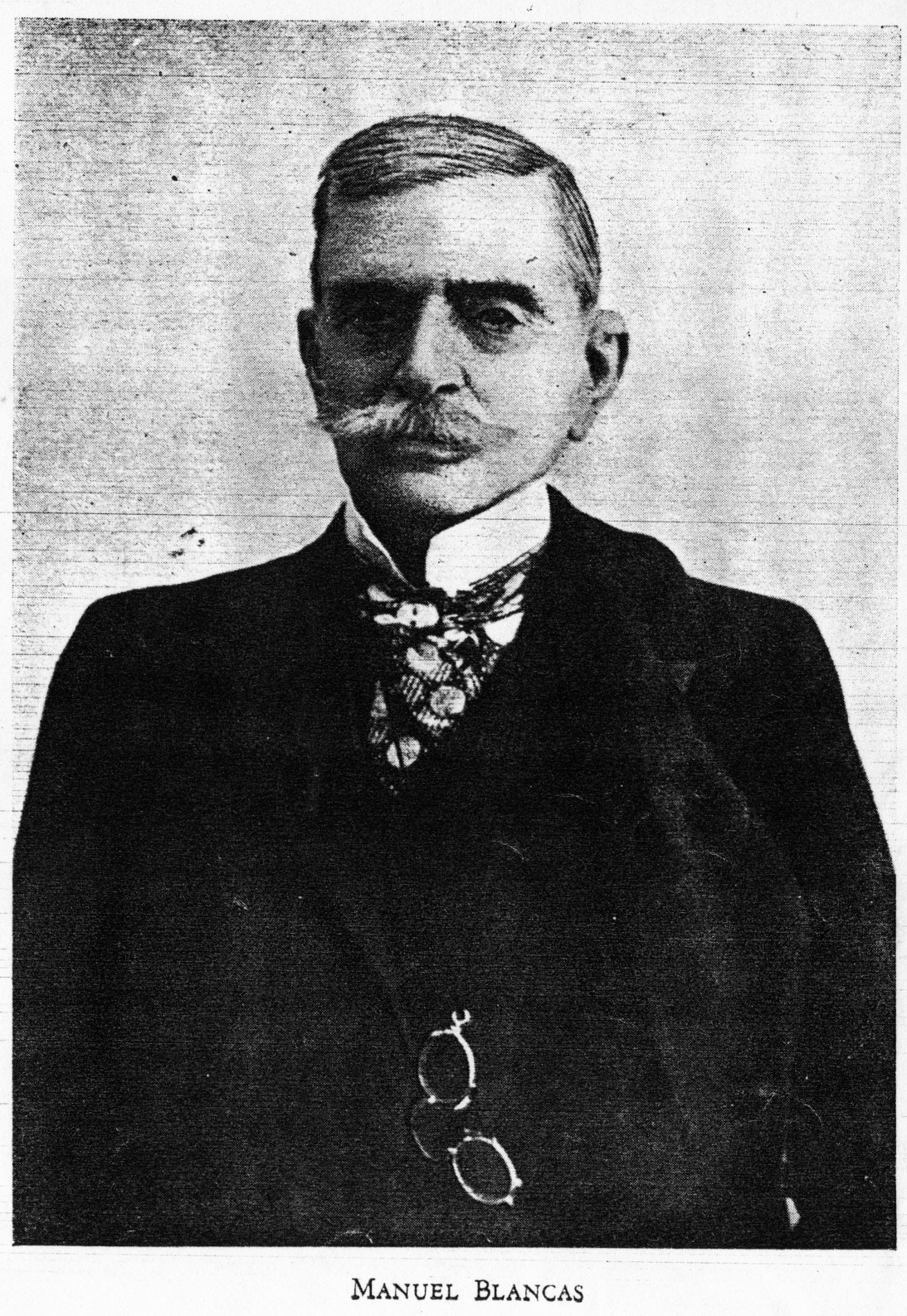 MANUEL BLANCAS Médico, académico.